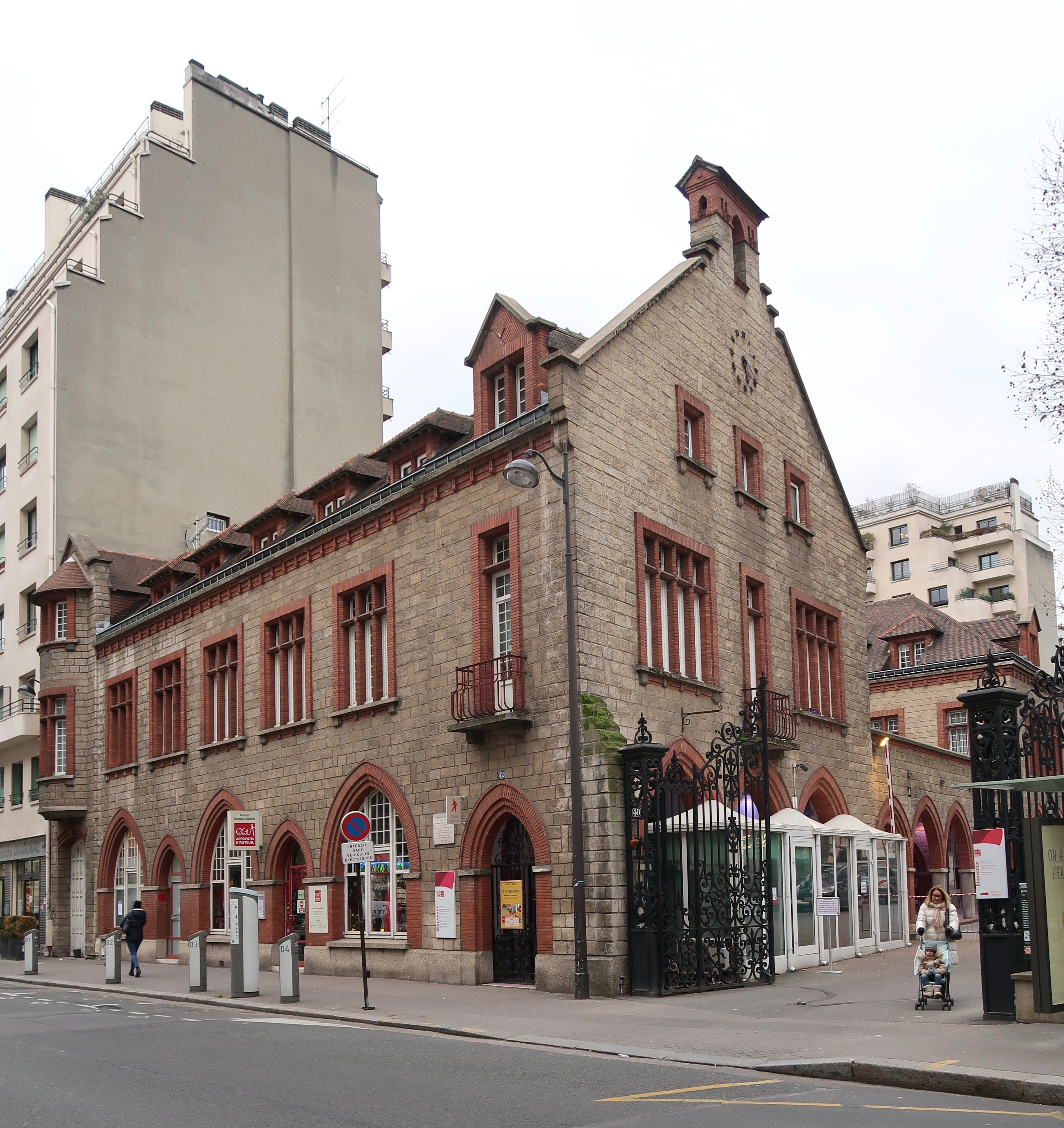 Fondation d'Auteuil, 40 rue Jean-de-la-Fontaine (Paris, 16e).